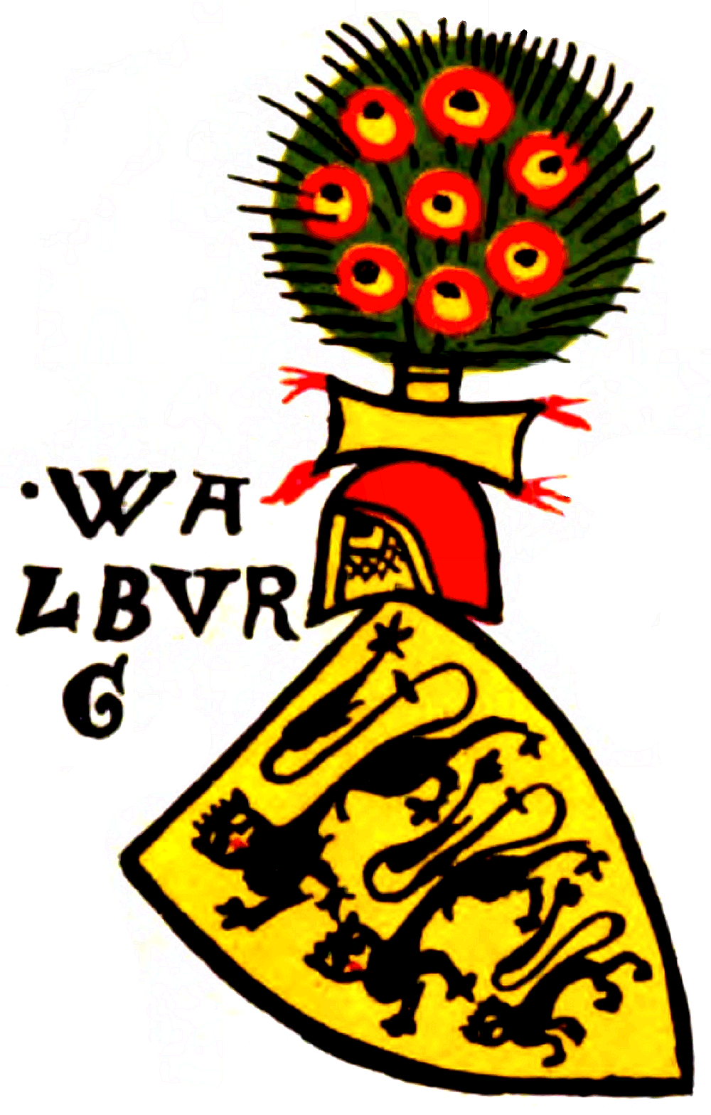 Stammwappen der Waldburg (hier Walburg)